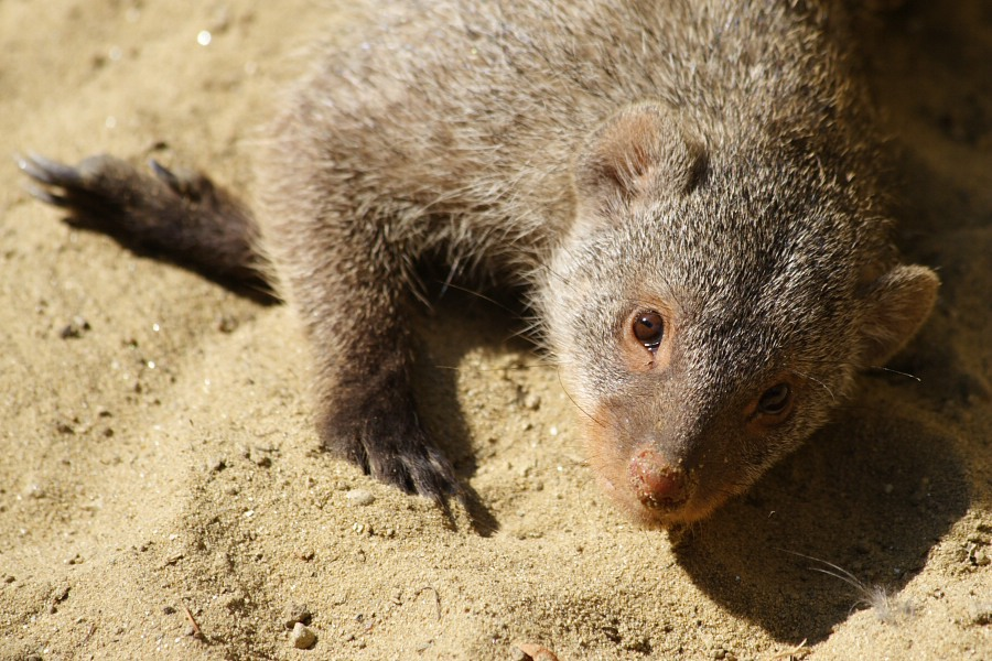 Zebramanguste (Gesicht; Profil)